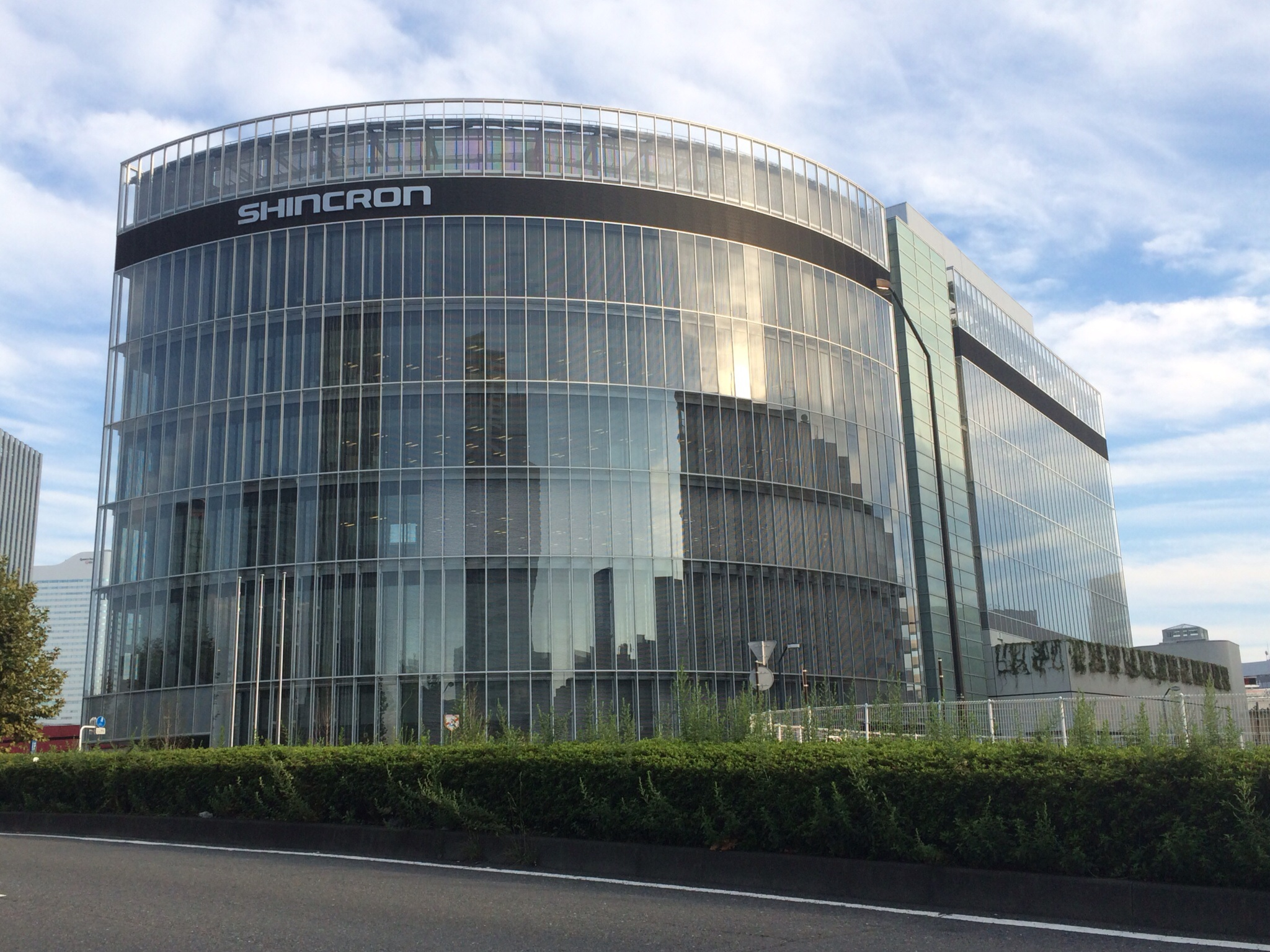 シンクロン本社ビル（新館完成後）。建物正面の北西側より撮影。